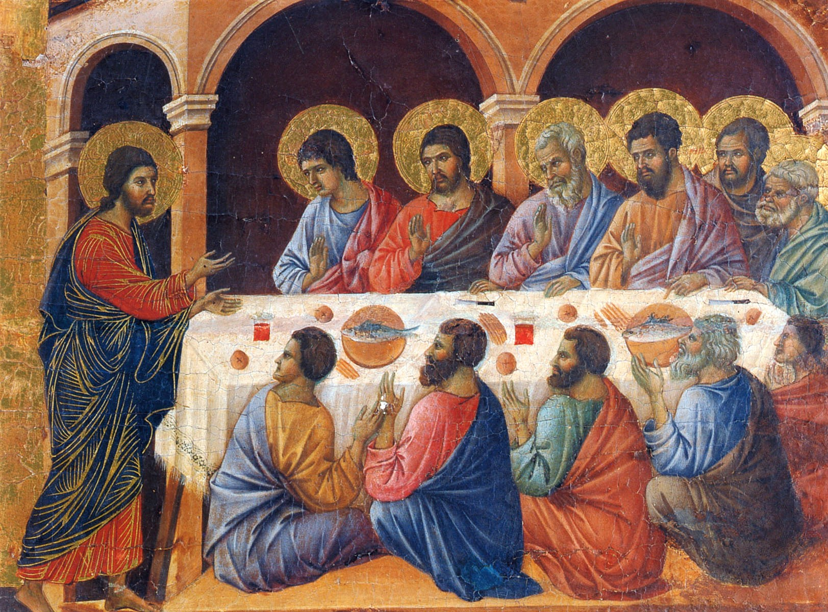 Maesta Duccio detail